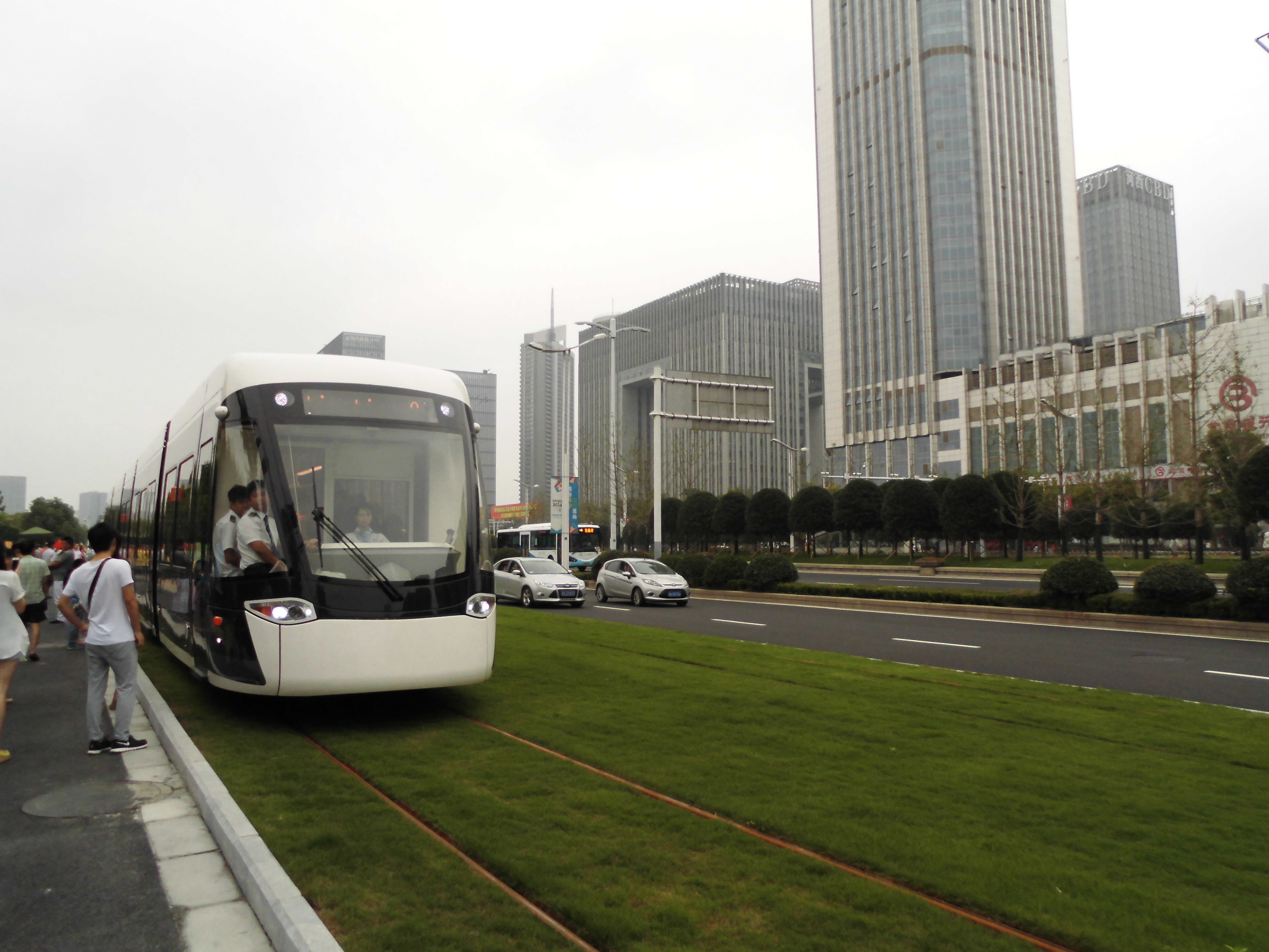 南京有轨电车1号线，列车出站。